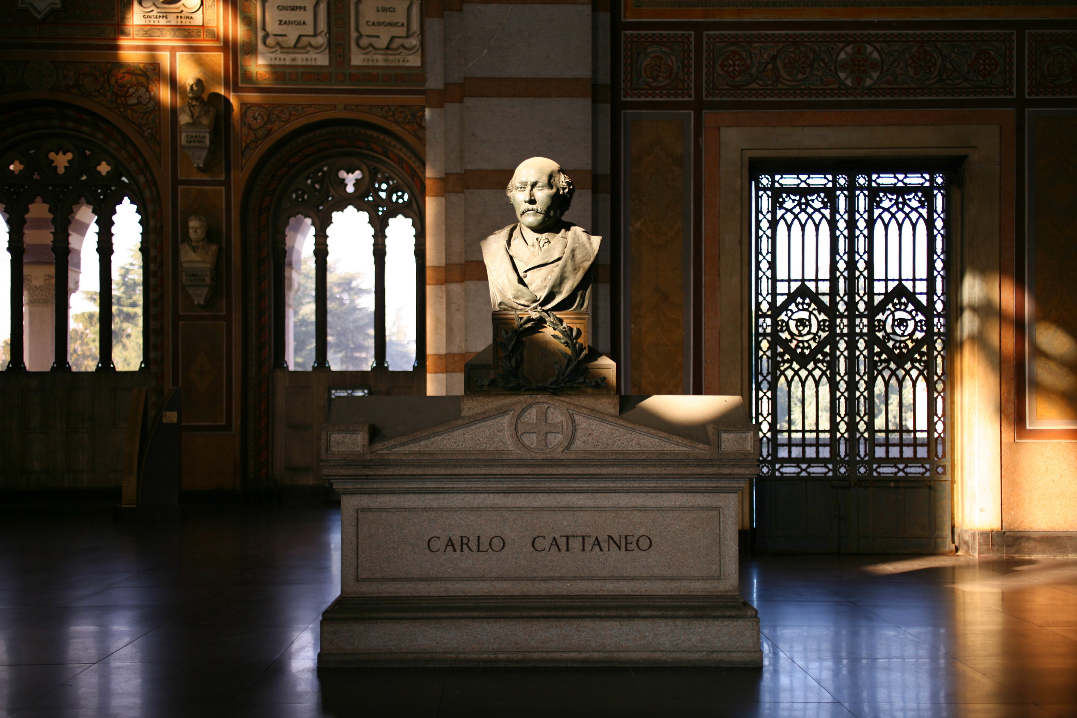 Tomba di Carlo Cattaneo, Famedio del Cimitero Monumentale di Milano